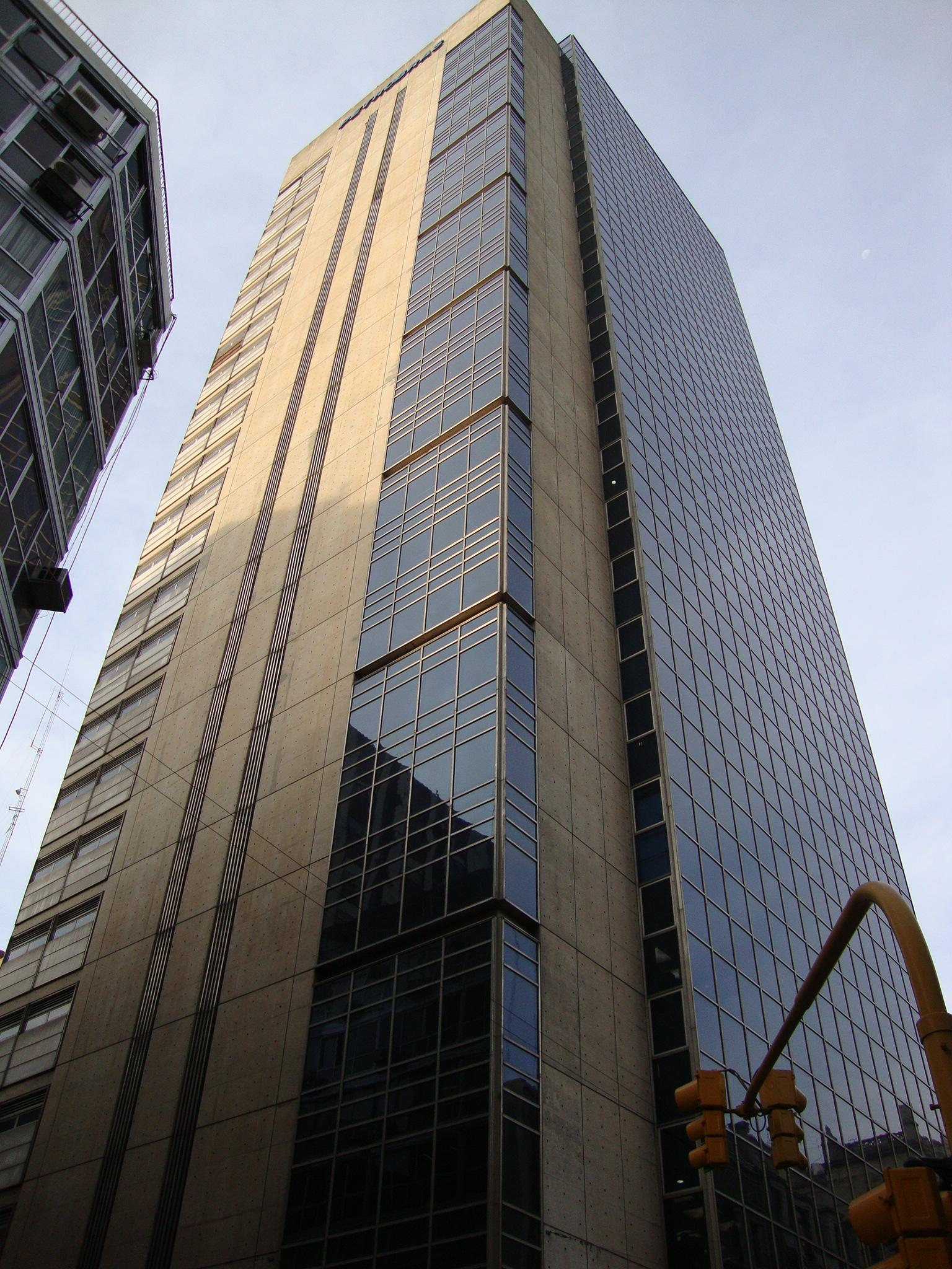 La Torre Pérez Companc (hoy Petrobras) vista desde la esquina sudoeste de las calles Rivadavia y Chacabuco. Buenos Aires, Argentina.